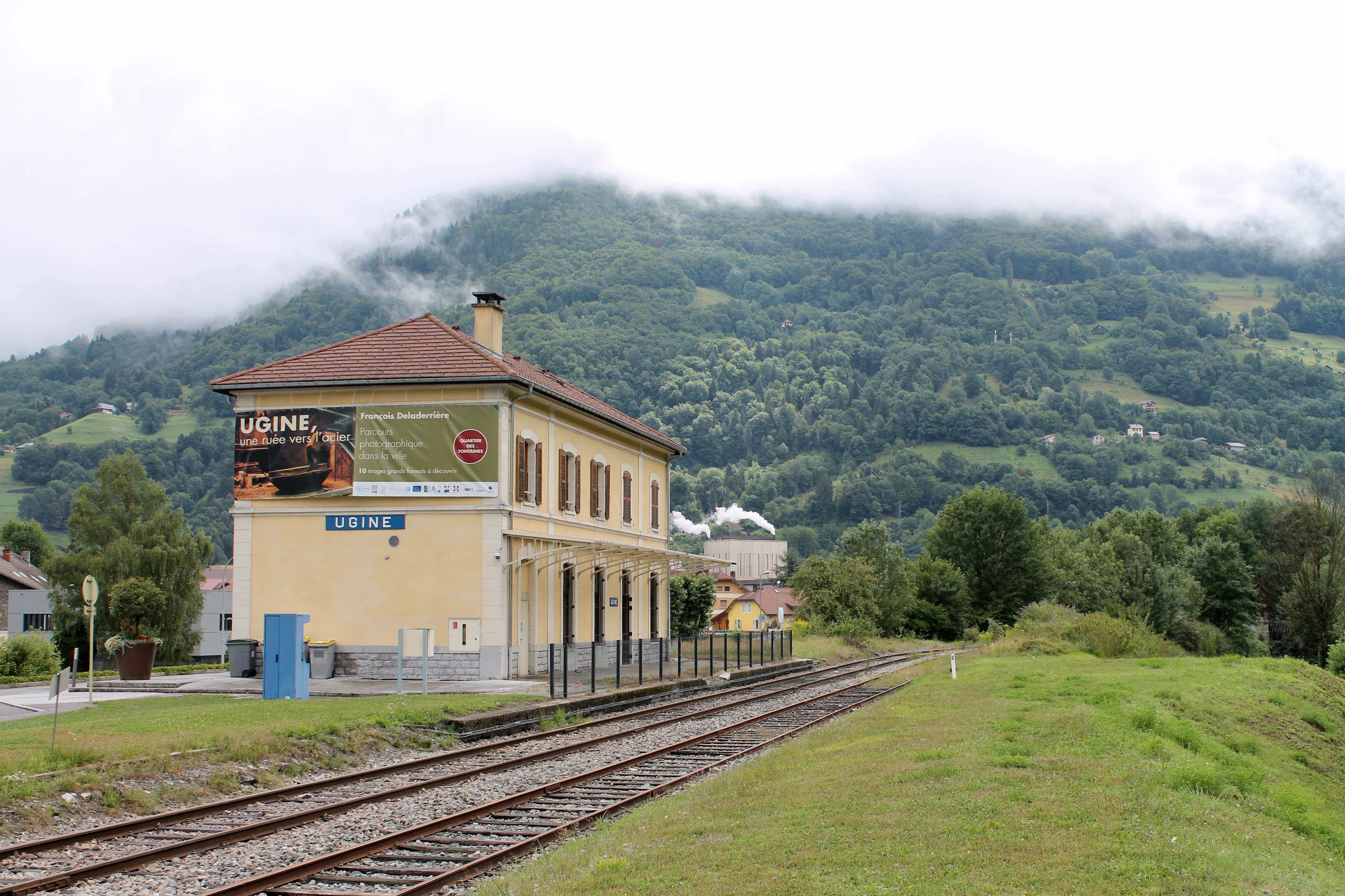 Office du tourisme d'Ugine dans l'ancienne gare d'Ugine.